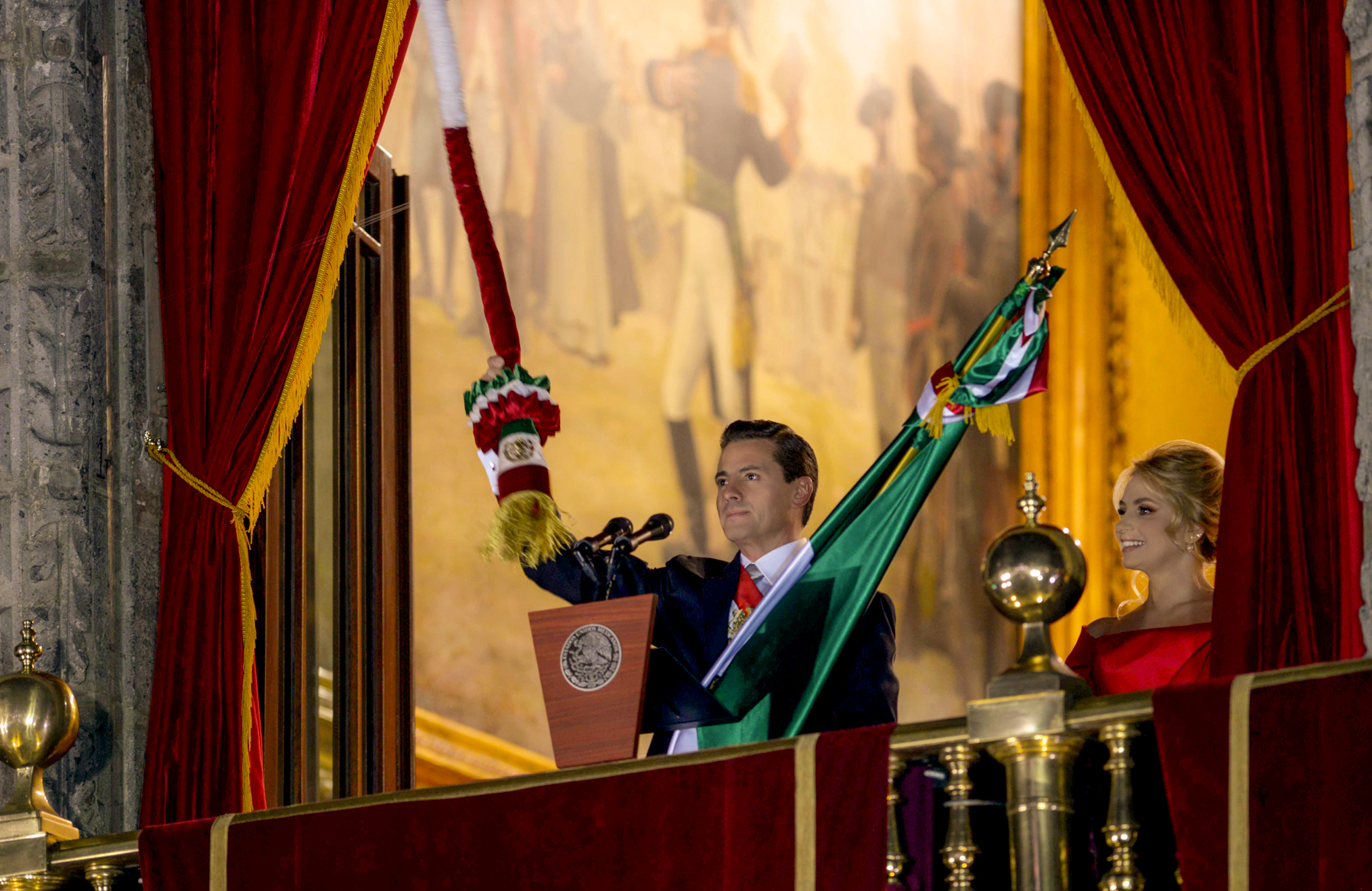 El Presidente Enrique Peña Nieto encabezó el 208 Aniversario del inicio de la Gesta Independentista, con la tradicional ceremonia del Grito.